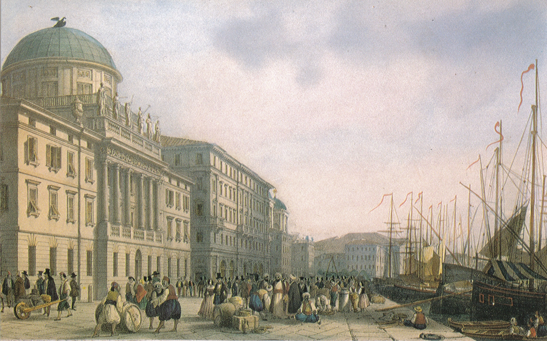 Painting by Giovanni Pividor "La Riva Carciotti": Palazzo Carciotti on Riva 3 Novembre in Trieste, Italy